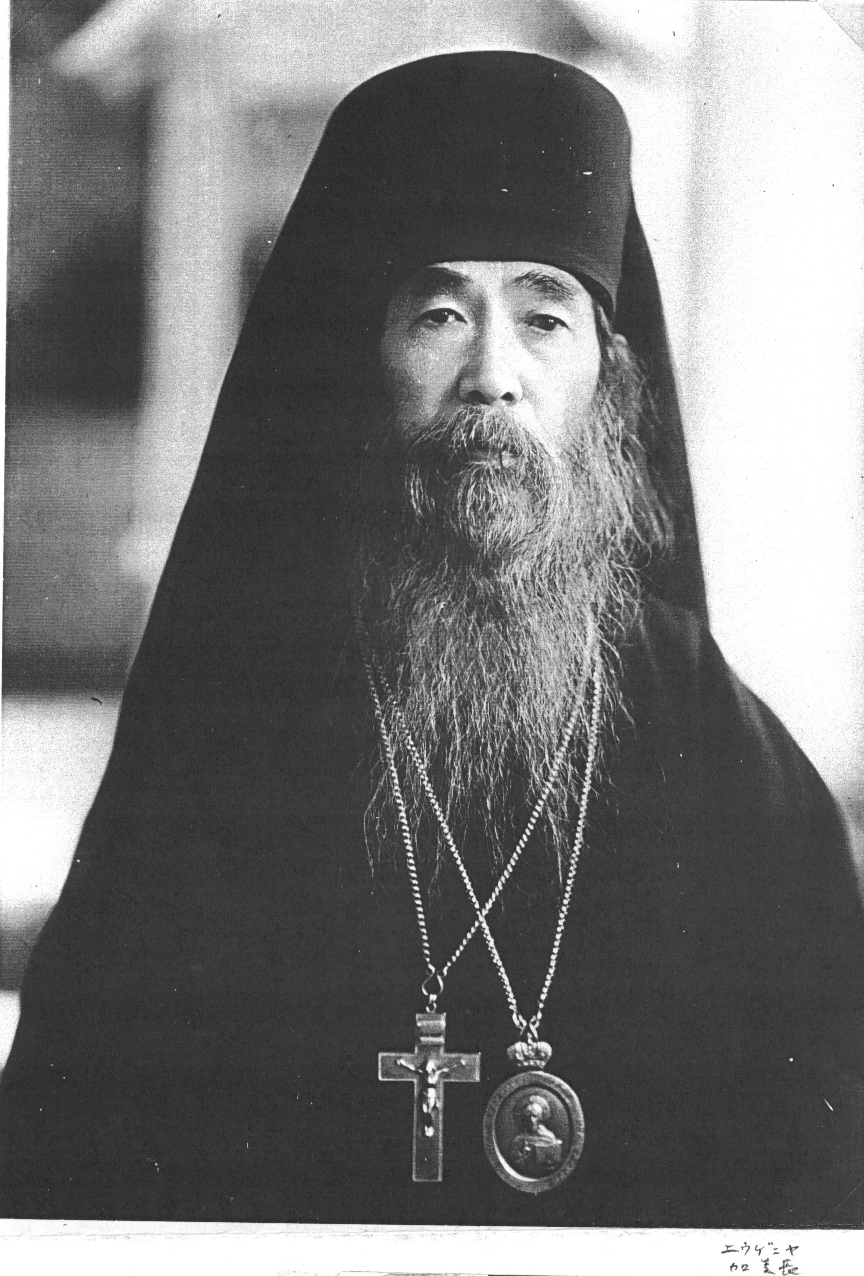 Епископ Николай (Оно)